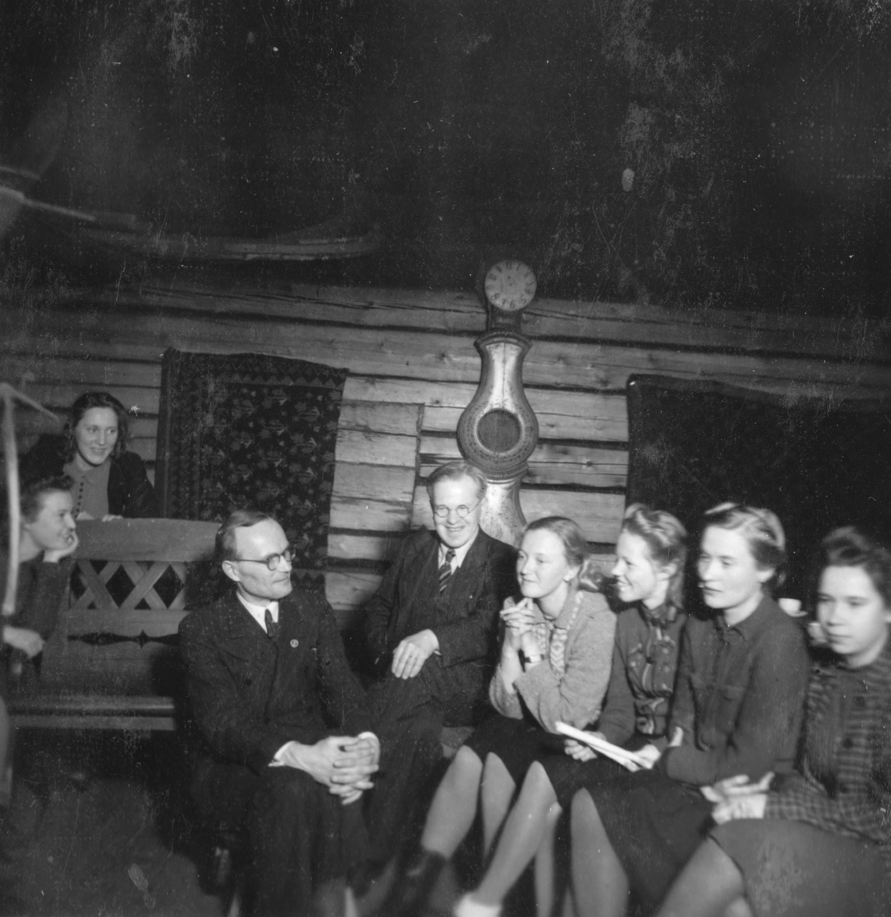 Kuva on Jyväskylän kasvatusopillisen korkeakoulun pitämästä takkavalkea iltamasta. Kuva on otettu Seminaarenmäellä sijaitsevassa Riihessä. Kuvan kaksi miestä ovat suomen kielen professori ja vararehtori Aarni Penttilä sekä suomen kielen kielen lehtori Ahti Rytkönen. Kuvassa näkyvät kuusi tyttöä ovat opiskelijoita. Kuvan alapuolelle on kirjoitettu 'hämäläisten takkavalkea-iltoja'.